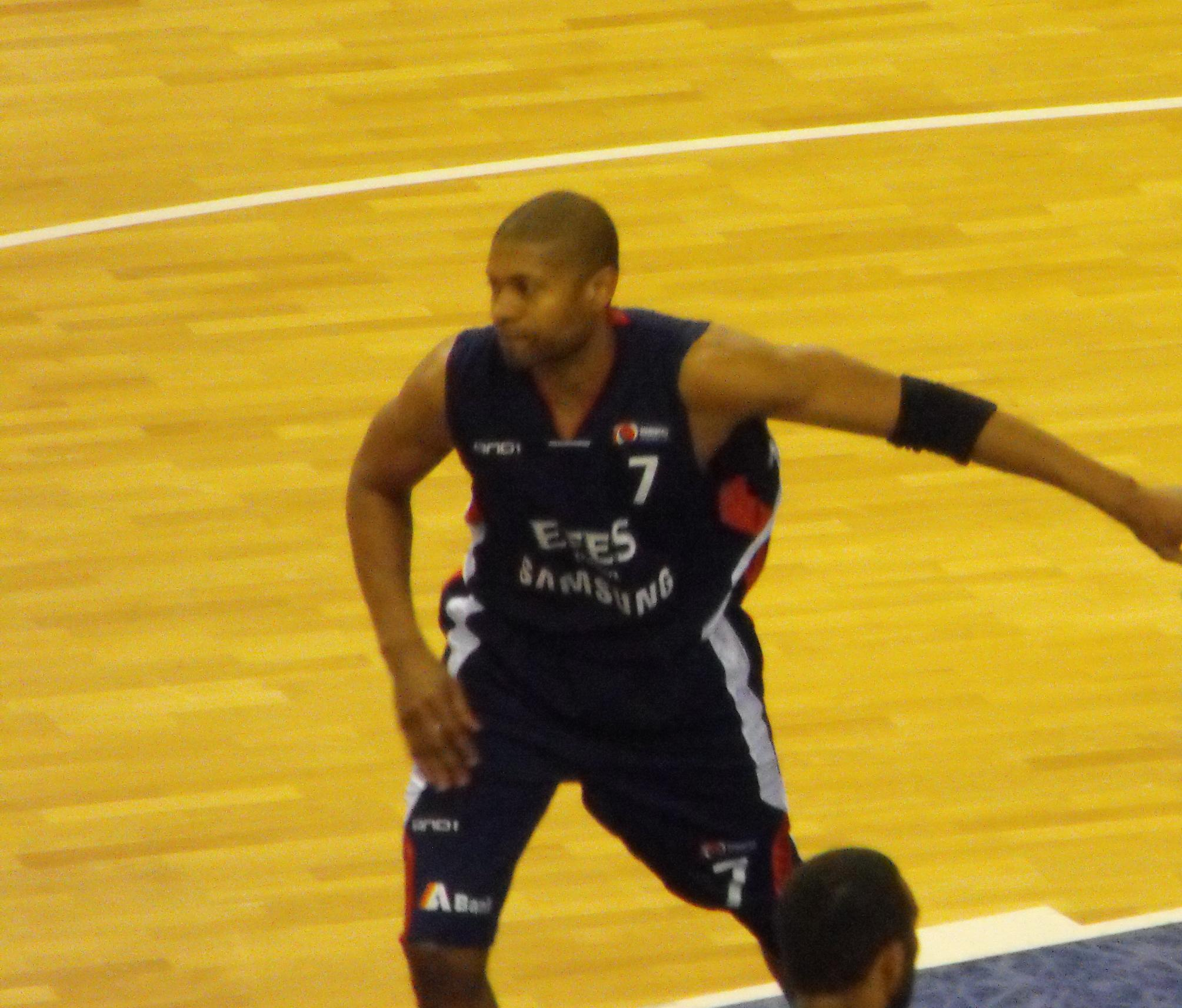 Bornova Belediye-Efes Pilsen maçı, Charles Smith